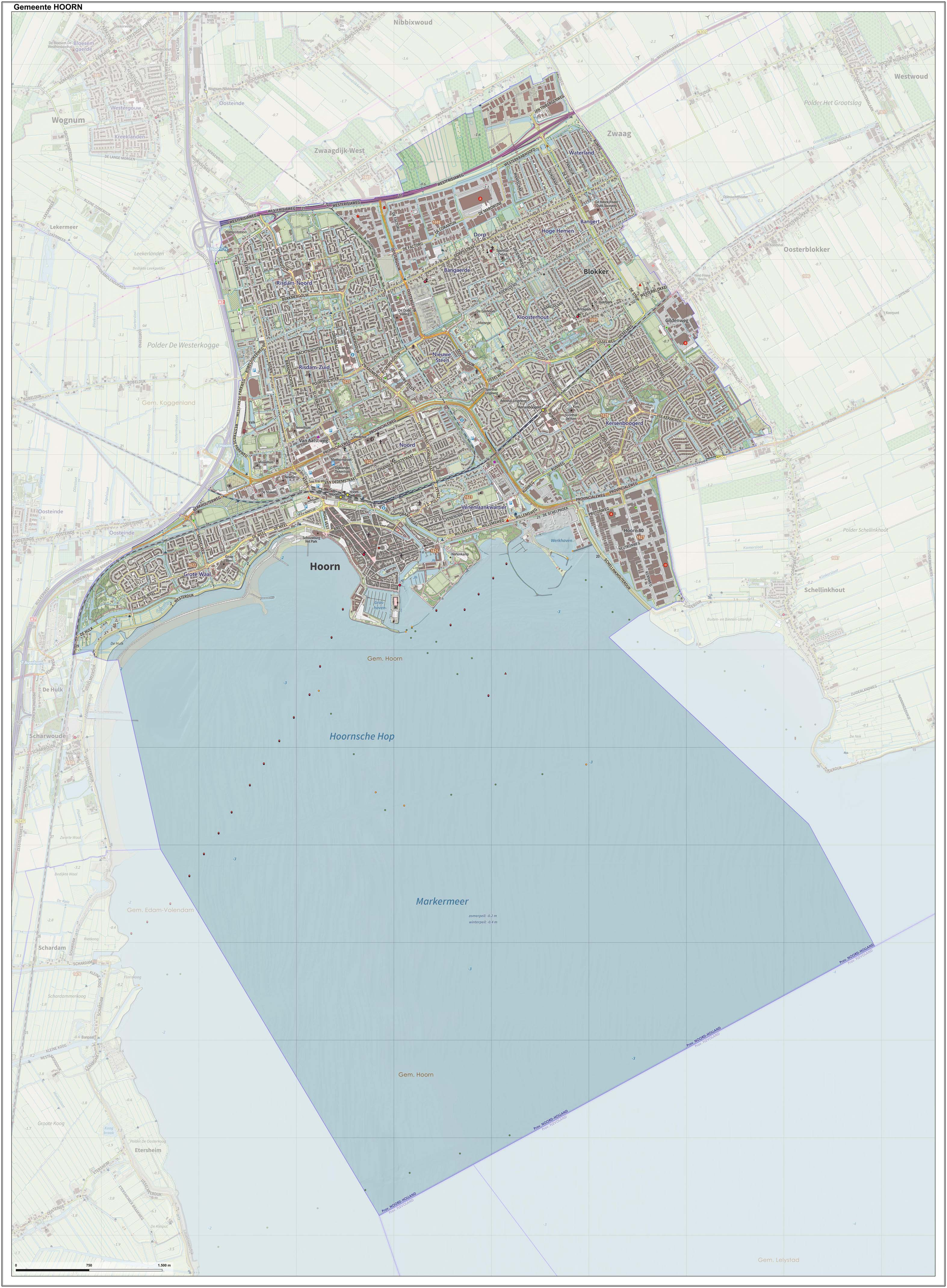 Topografische gemeentekaart. Resolutie: 400 pixels/km. Kaartbeeld samengesteld uit de open geodata van de Top10NL en Top25namen (Kadaster), Creative Commons-BY licentie. Gebouwvlakken uit open geodata BAG extract. Wegen uit de OpenStreetMap, OpenStreetMap community. Reliëfschaduw uit de Actuele Hoogtekaart AHN2. Samenstelling en kleurenschema: Jan-Willem van Aalst, met QGIS. Zie ook de Legenda.